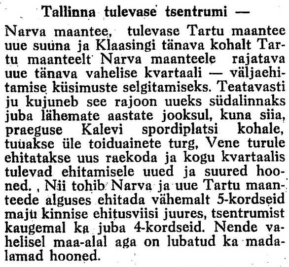 Päwaleht, nr 75